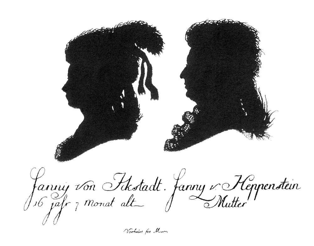 Scherenschnitte von Fanny und ihrer Mutter Maria Franzisca von Weinbach